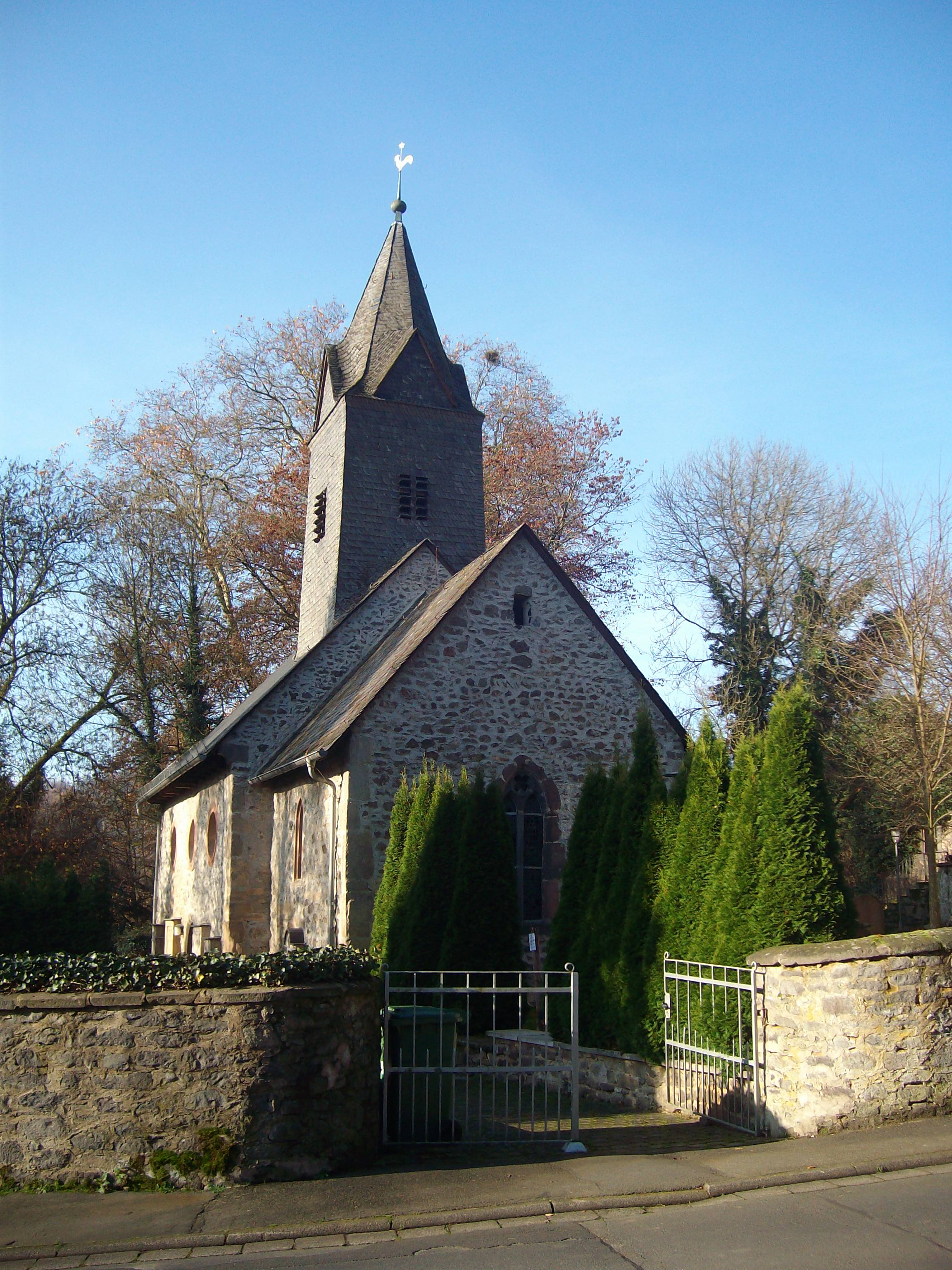 Evangelische Kirche Winnerod, Gemeinde Reiskirchen, Landkreis Gießen, Hessen, Deutschland